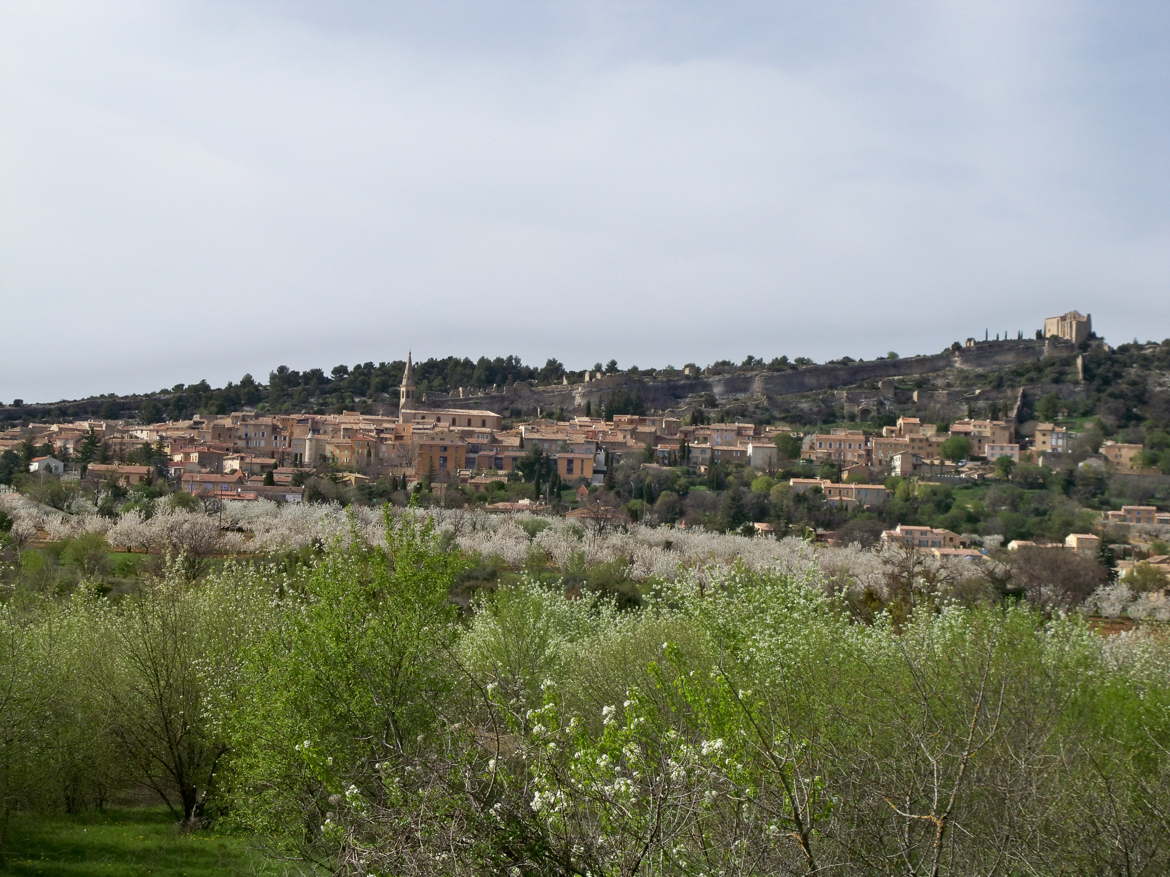 vue sur Saint Saturnin lès Apt, Vaucluse, France